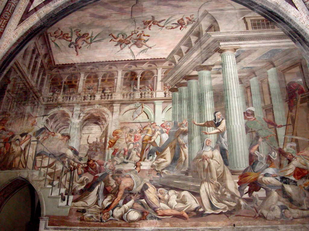 Fiammenghini, Martirio delle monache cistercensi a Vittavia (1615 ca.). Affresco del transetto dell'Abbazia di Chiaravalle a Milano. Foto da me realizzata.